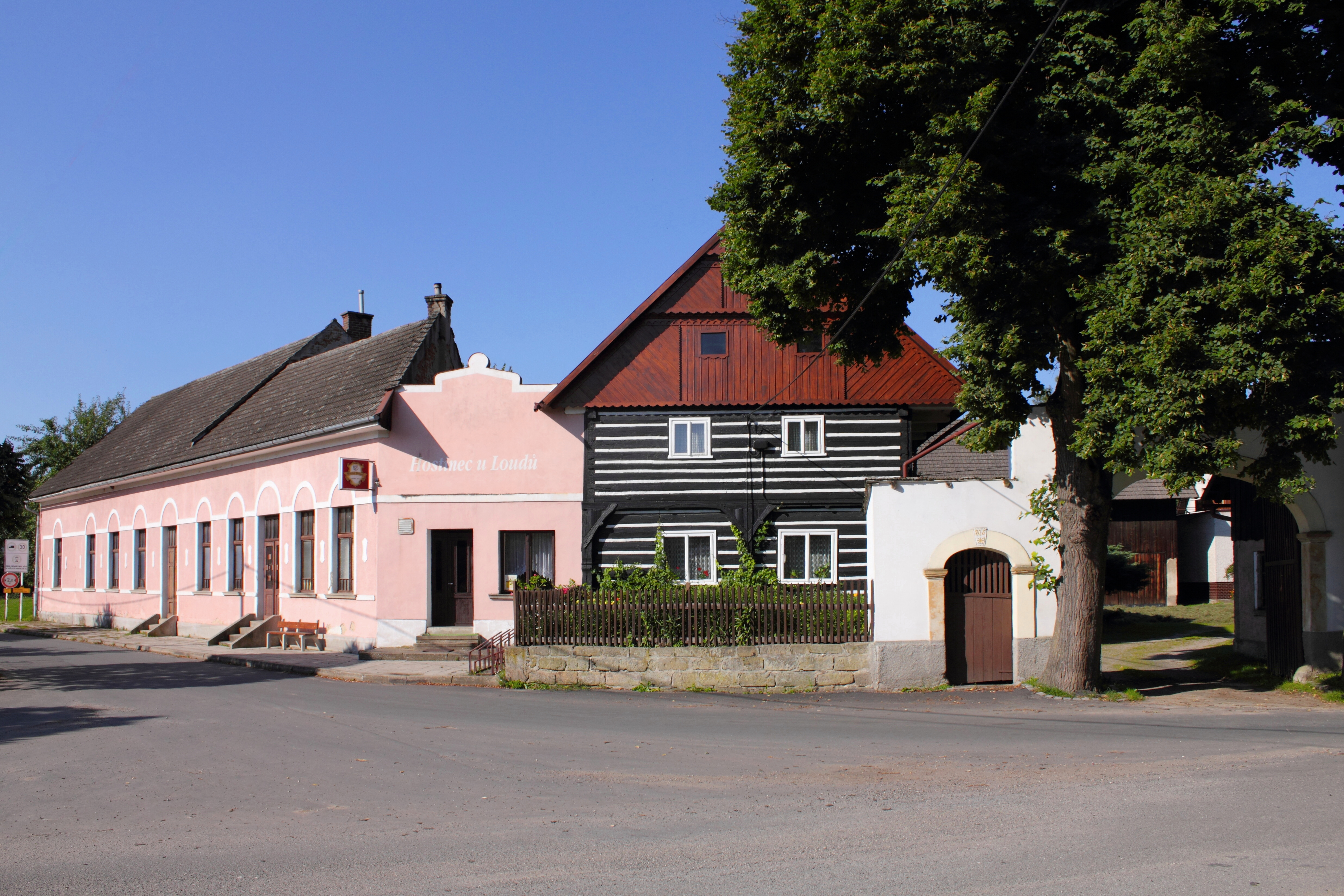 Statek a hostinec U Loudů, Ploukonice č. p. 5.